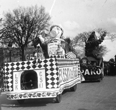 Chars réclames défilant à la Mi-Carême 1927 à Paris.